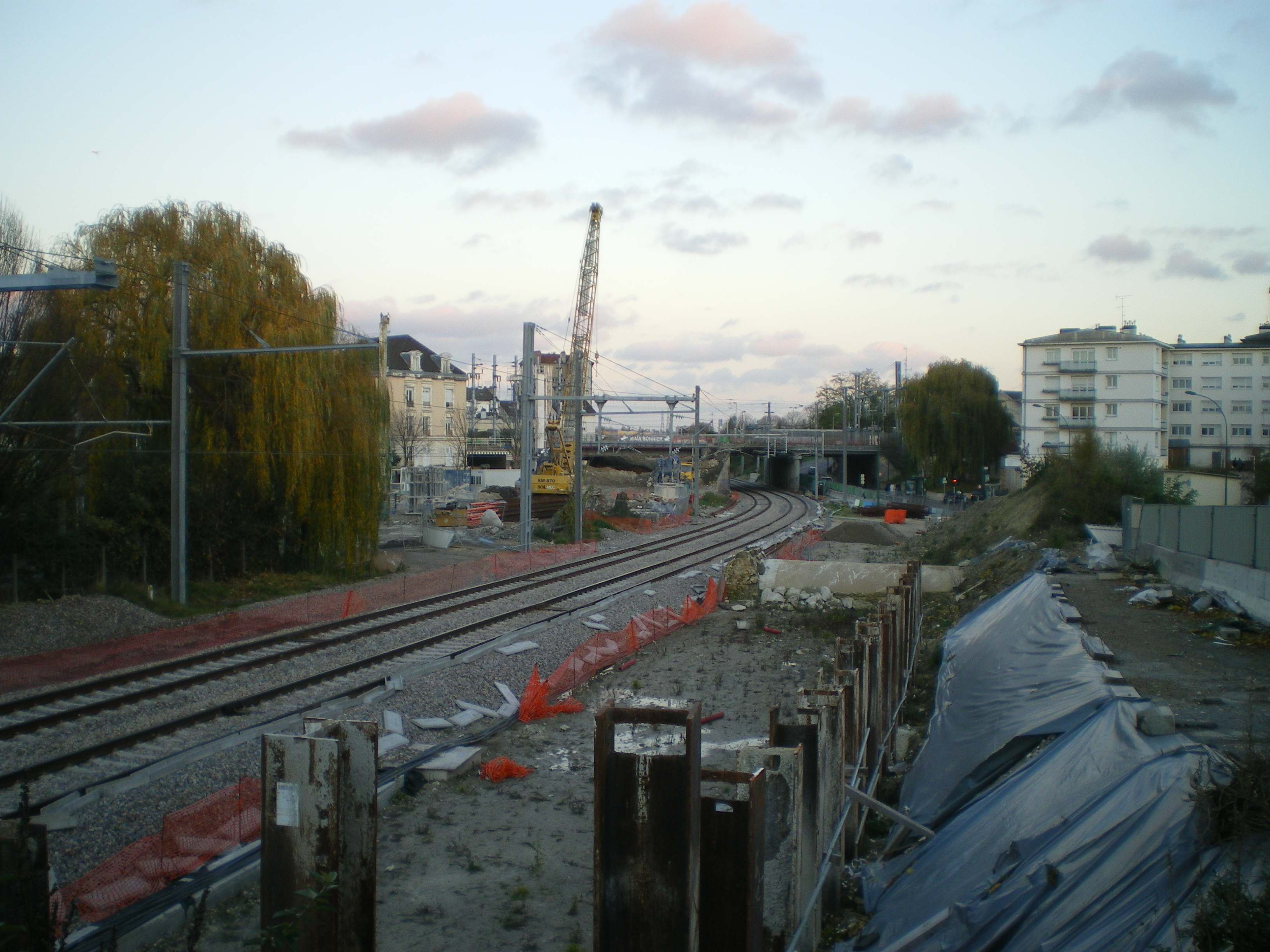 Travaux de la tangentielle nord novembre 2012